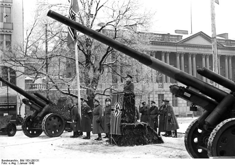 Posen, Vereidigung von Rekruten Auf dem mit den Fahnen Grossdeutschlands geschmückten Wilhelmplatz in Posen fand in Anwesenheit des Kommandierenden Generals und Befehlshabers sowie des Reichsstatthalters die erste Vereidigung der Rekruten des Heeres des Standortes Posen statt. In seiner Rede an die jungen Soldaten betonte der General, dass bei allen vom jüngsten Rekrut bis zum obersten Führer der Glaube an den Sieg unserer gerechten Sache unerschütterlich ist. Unser Bild zeigt den Kommandierenden General während seiner Ansprache an die Soldaten. Scherl Bilderdienst AV 57730 205-40 Information added by Wikimedia users.